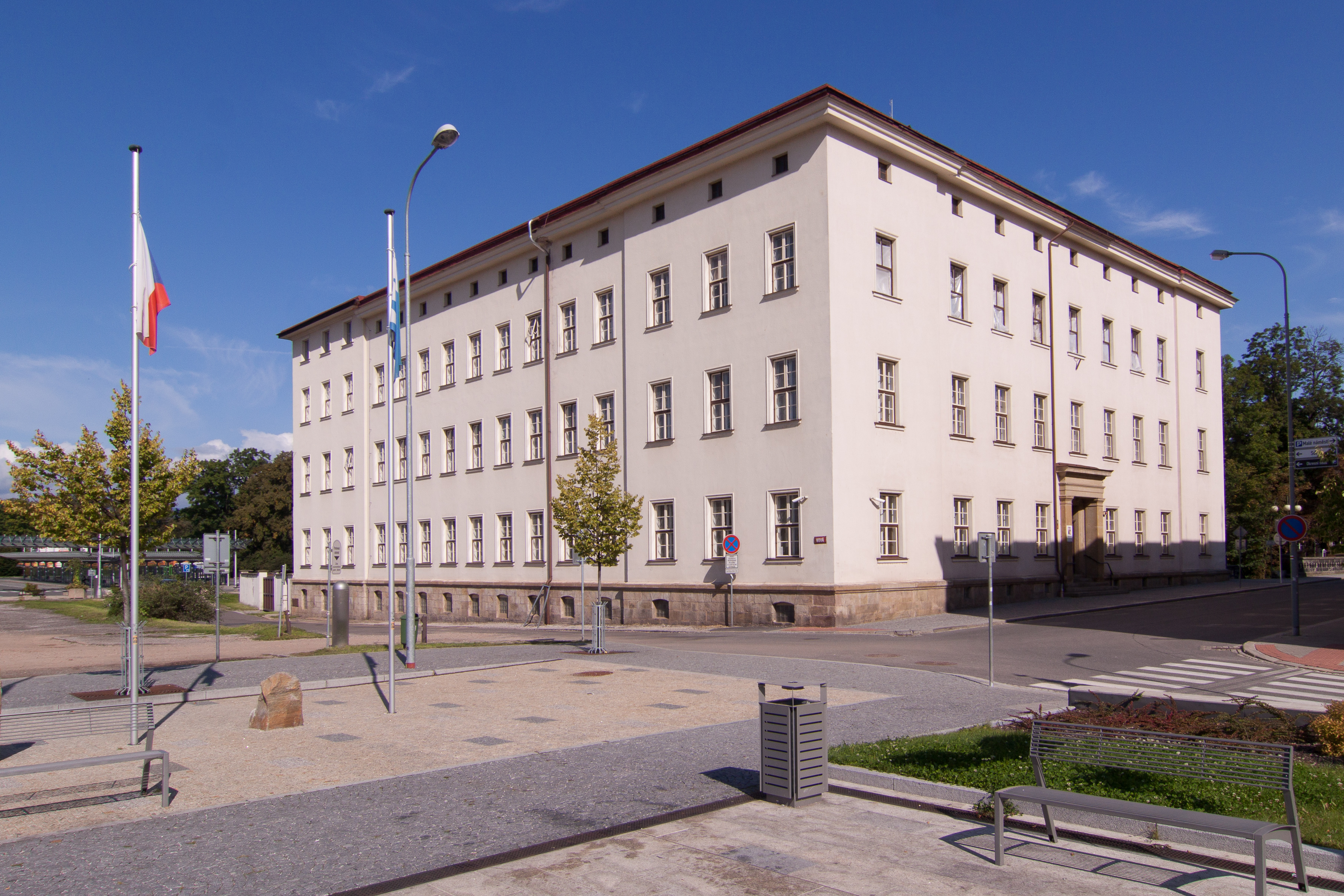 Okresní soud (Trutnov), Nádražní 106/5, Trutnov